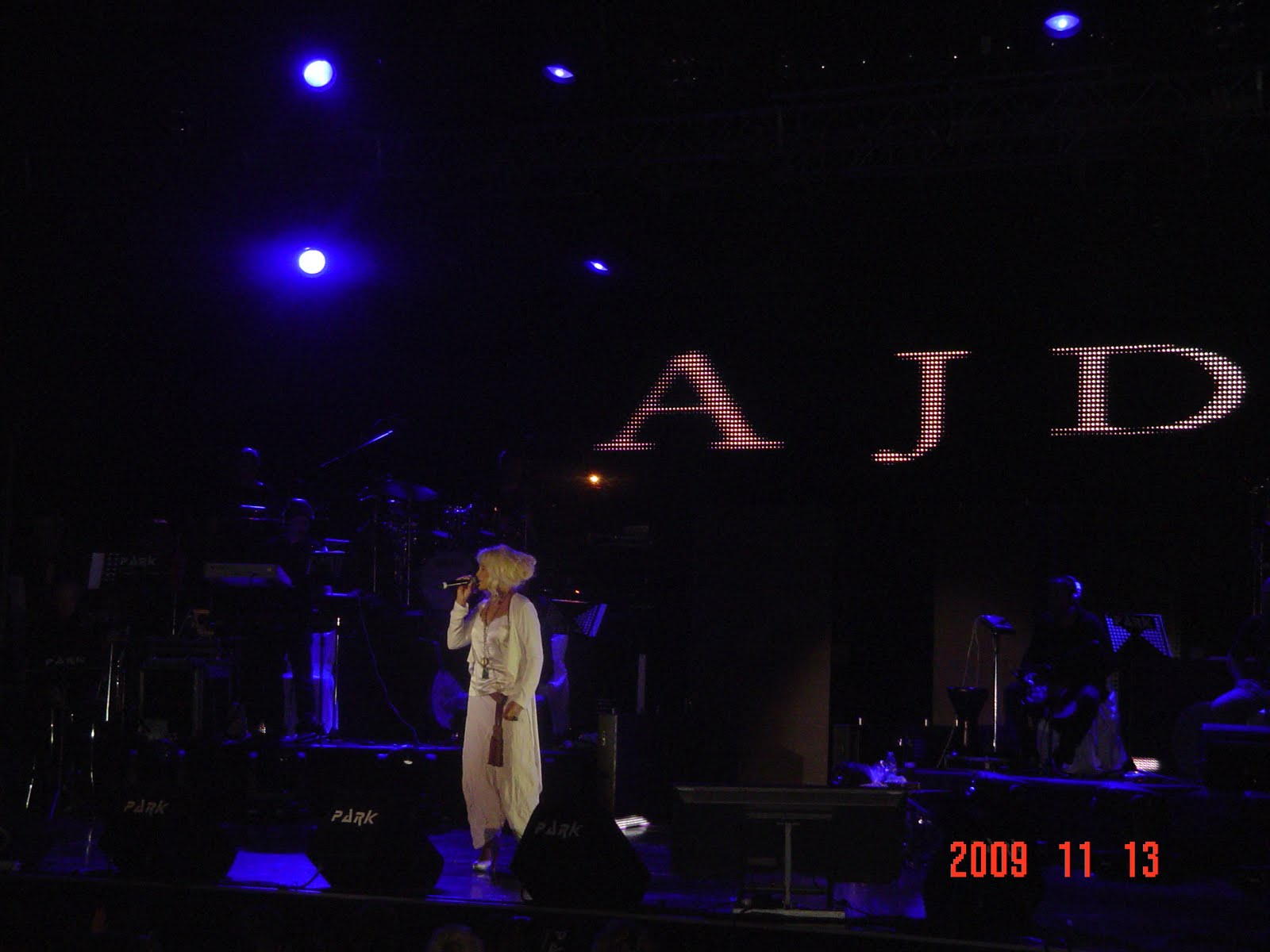 Ajda Pekkan Anadolu Gösteri Merkezi konseri,.